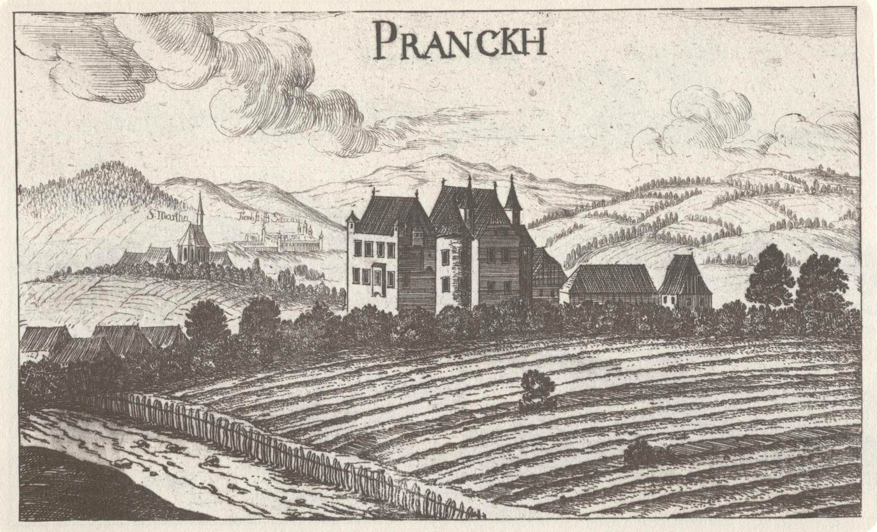 Vischer-Stich des Schlosses Pranckh um 1672